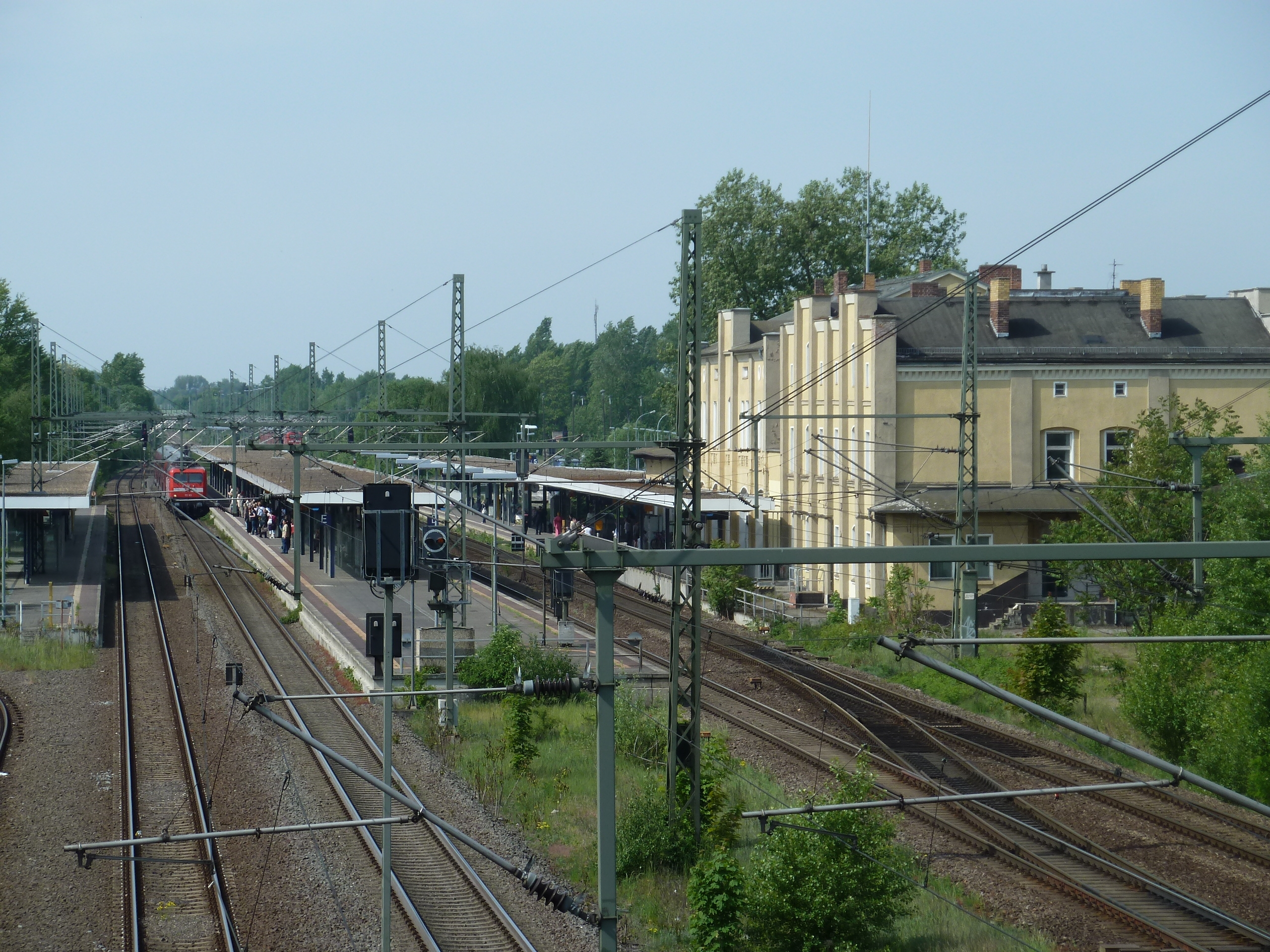 Brandenburg Hauptbahnhof, Gleisanlagen